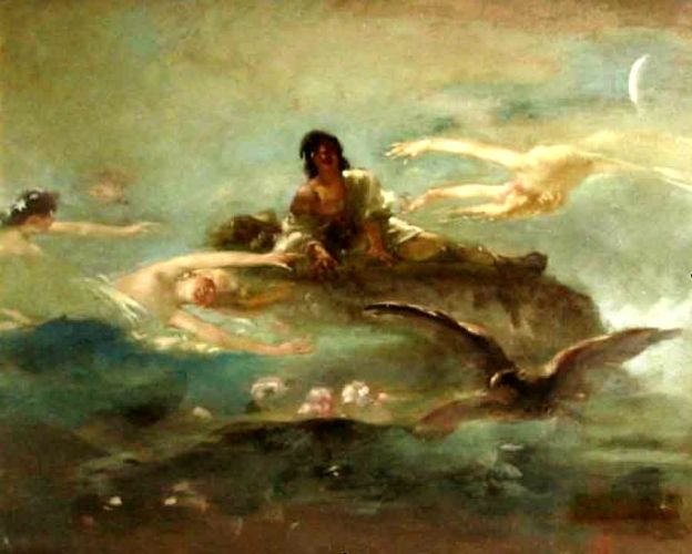 Vârful cu dor, ulei/pânză, L: 560 mm; LA: 680 mm - Muzeul de Artă - TULCEA - Compoziţie deschisă şi dinamică cu mai multe personaje, având ca centru de interes un tânăr cioban. În jurul lui trei personaje feminine îşi întind mâinile într-un gest de îmbrăţişare. Personajele feminine se contopesc în peisaj cu valurile de ceaţă albăstrie, ce conferă întregului tablou o atmosferă ireală, de vis. Jos în partea dreaptă spre colţ, într-un plan mai apropiat se desluşeşte forma cenuşie a unei păsări în zbor. Cromatic este susţinută de o gamă rece, de albastru, gri şi brun. Maniera picturii este caracteristică stilului neoclasic de sec. XIX.